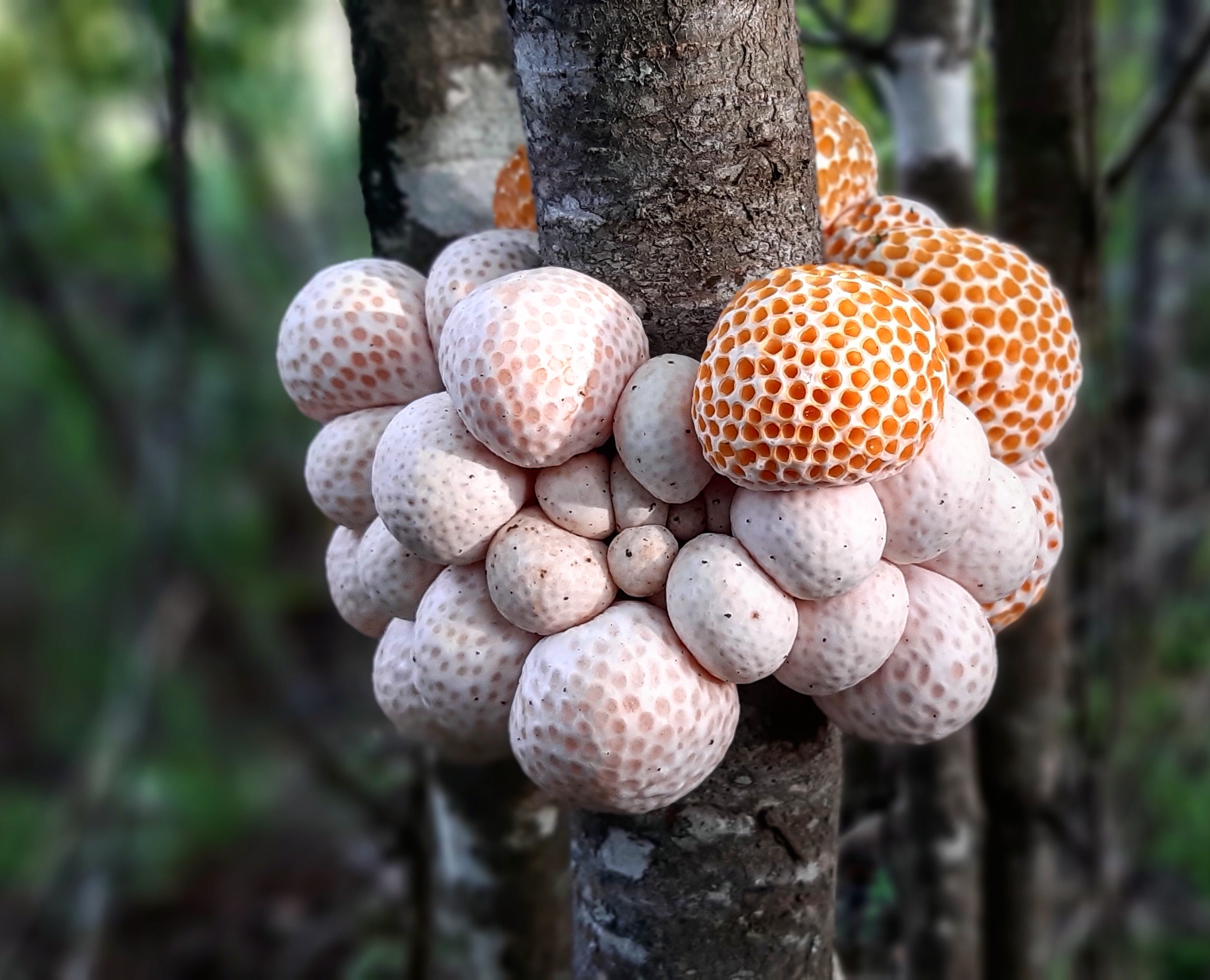 El Digüeñe es un hongo parásito comestible que crece en el sur de Chile asociado a árboles de la familia Nothofagus, principalmente Nothofagus oblicua o Roble chileno